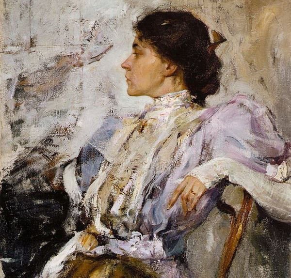 "Дама в лиловом" - картина Н.И. Фешина (1908)